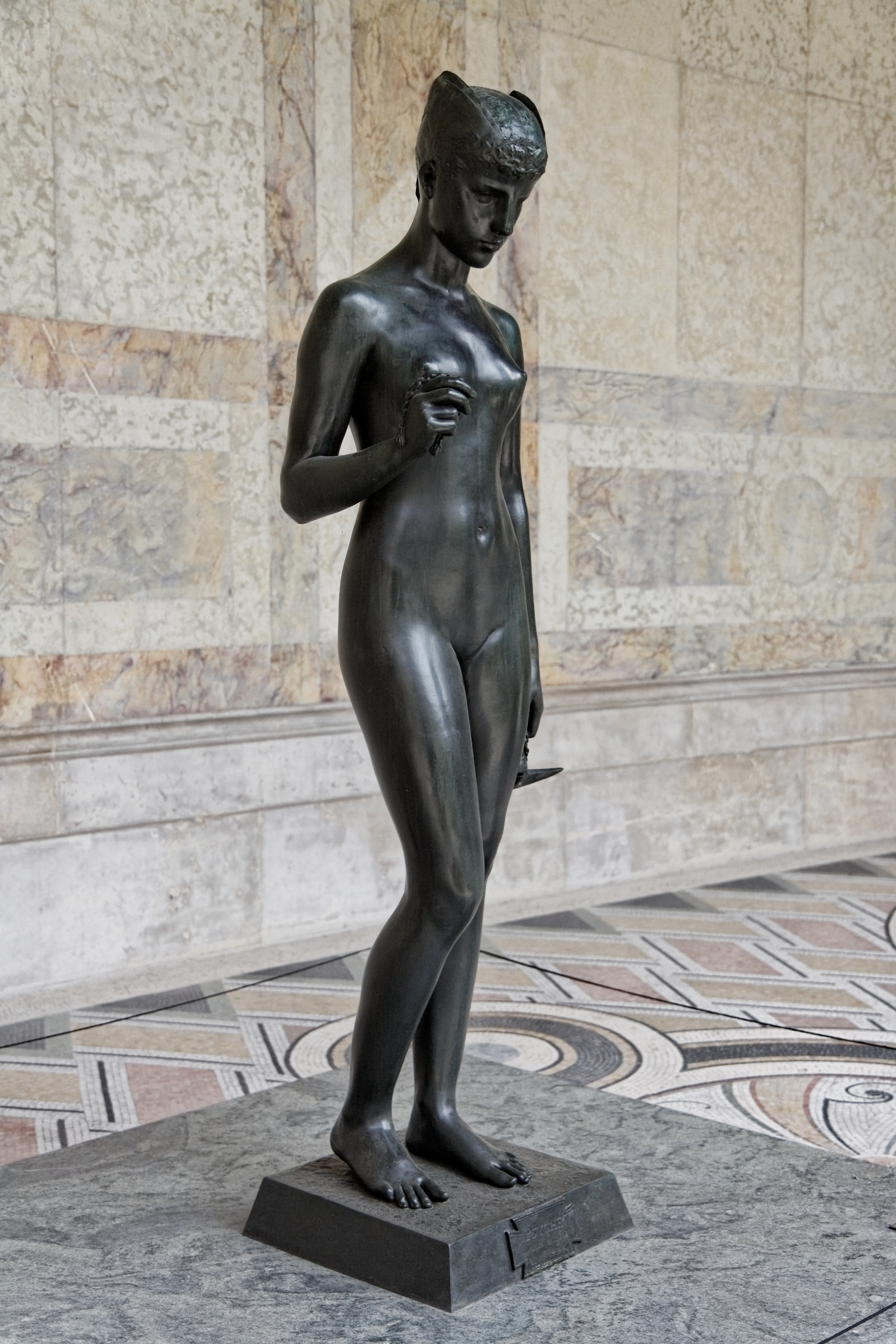 "Psyché sous l'empire du mystère", œuvre qui vaudra à Hélène Bertaux une médaille d'or de première classe lors de l'exposition universelle de 1889.